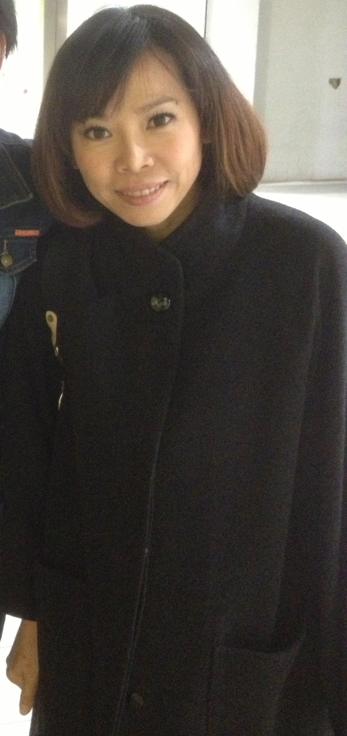 曾心梅在三立電視留影。